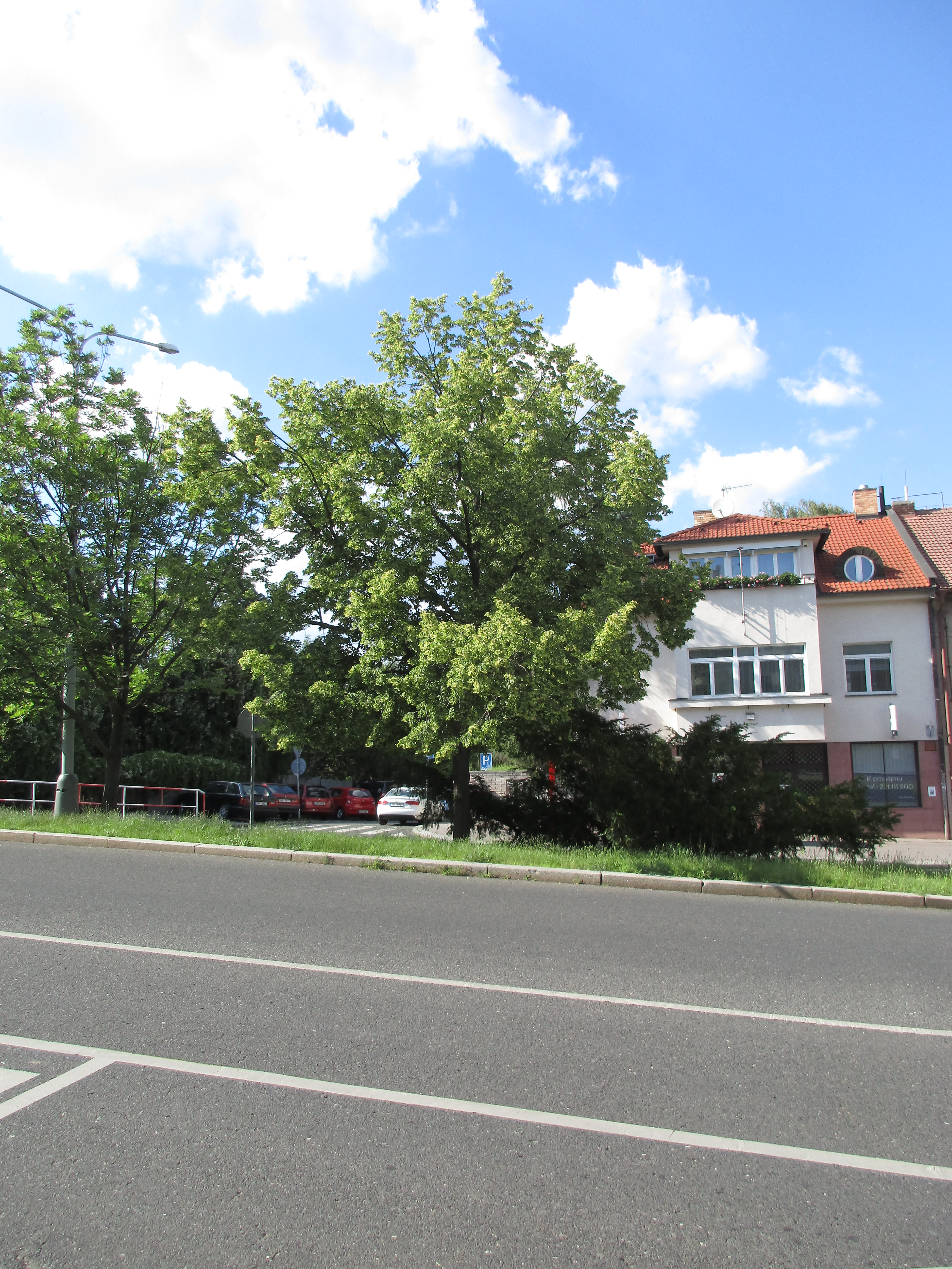 Lípa republiky. Praha 6 - Dejvice, křižovatka ulic Na Pískách, Šárecká a Na Špitálce. Vysazena roku 1968 na památku 50. výročí vzniku Československé republiky.